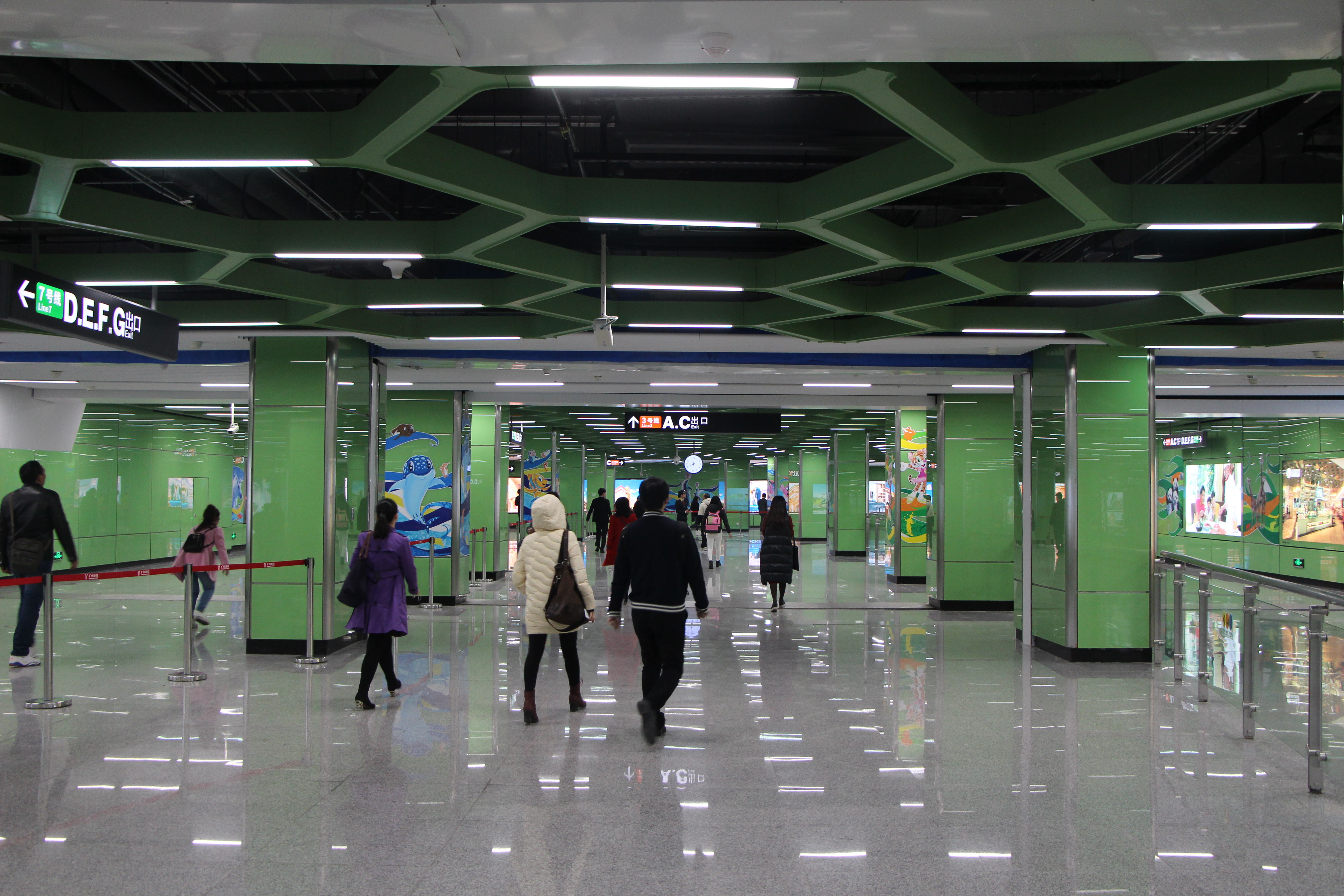 广州地铁汉溪长隆站